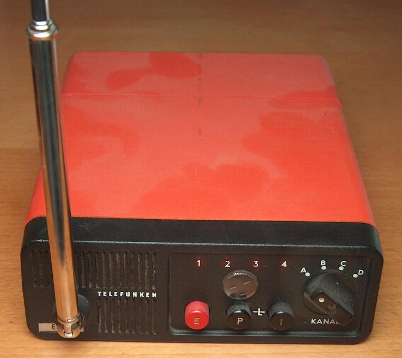 tragbarer Eurosignal Empfänger, Typ Telefunken "ES-2", Gewicht 600 g, Abmessung 50x 160 x130 mm